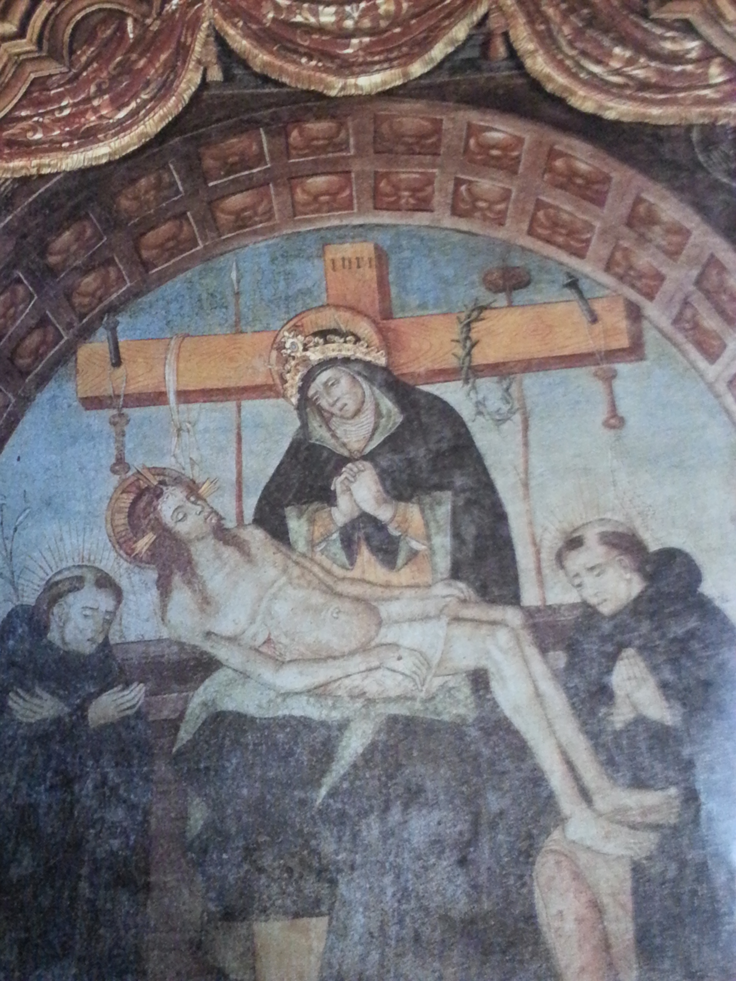 Affresco dell'Addolorata - Autore ignoto- Chiesa del Paradiso